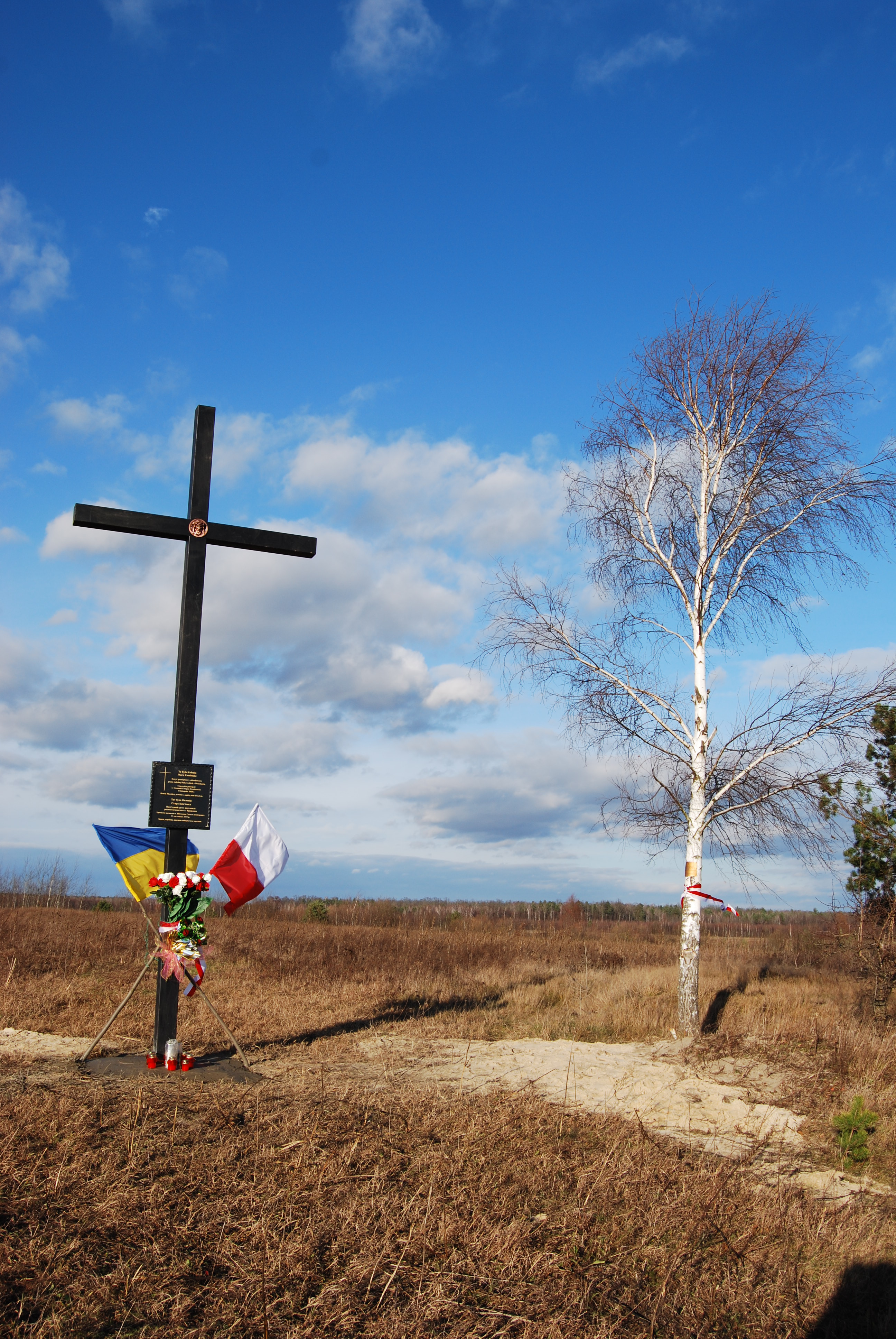 Stara Kamionka. Krzyż i tablica upamiętniająca nieistniejącą polską kolonię.